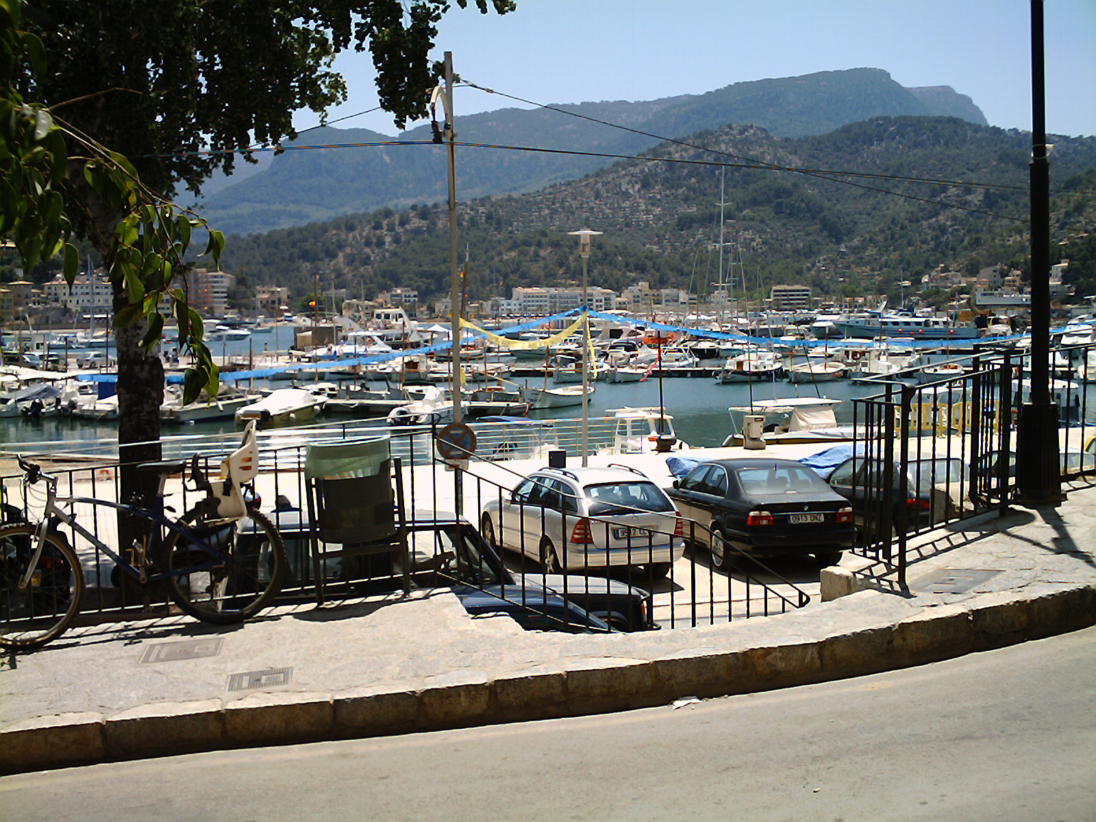 Port de Sóller, Juliol de 2006. Encara que segons les metadata aqueste imatge du data del 2005, aquesta imatge es va fer el 2006. Autor: Pérez